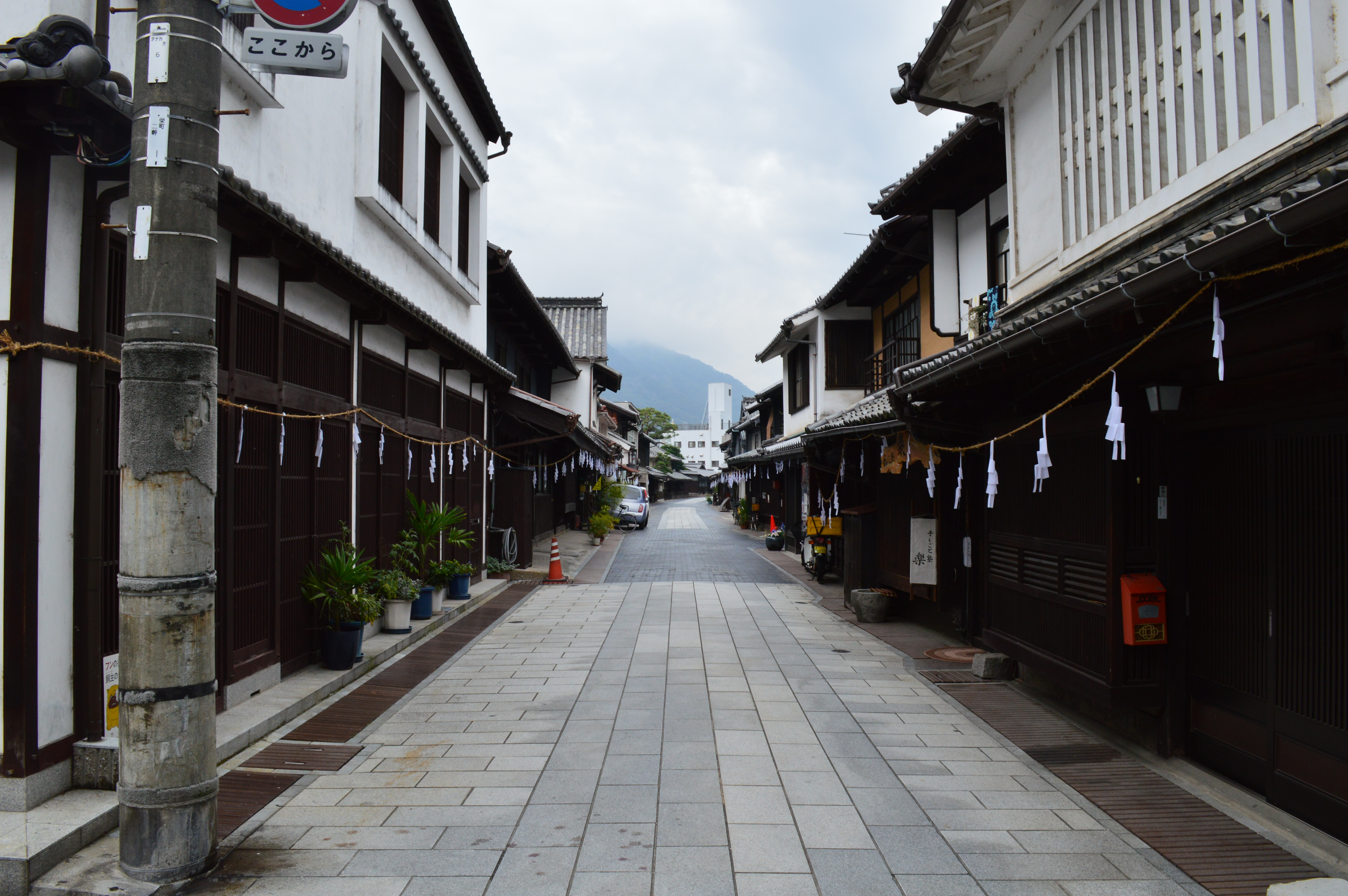 広島県竹原市の歴史地区